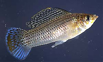 Poecilia latipinna Sailfin molly. [1]